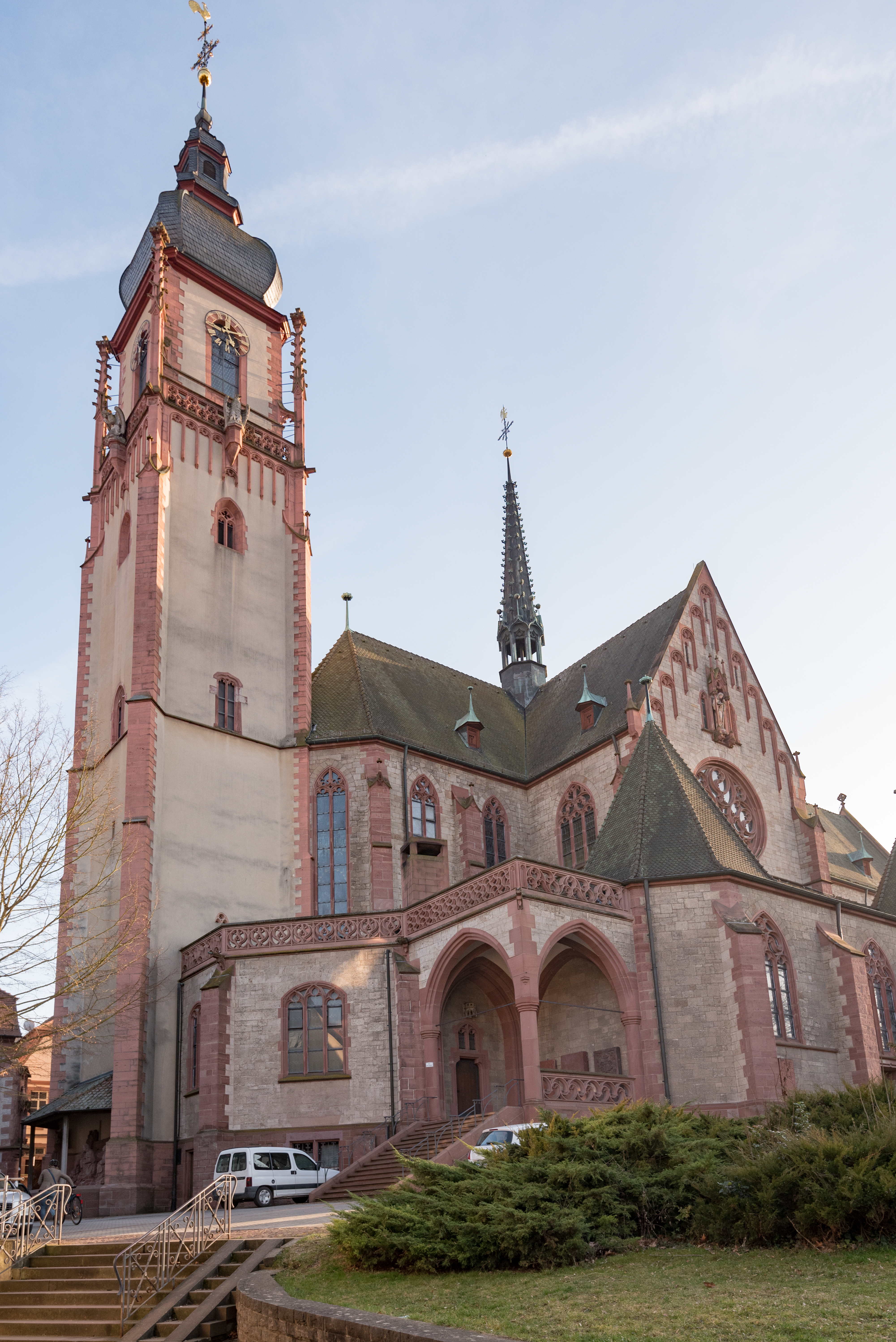 Tauberbischofsheim, Kath. Pfarrkirche St. Martin